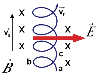 Positiivne laengukandja elektri- ja magnetväljas.